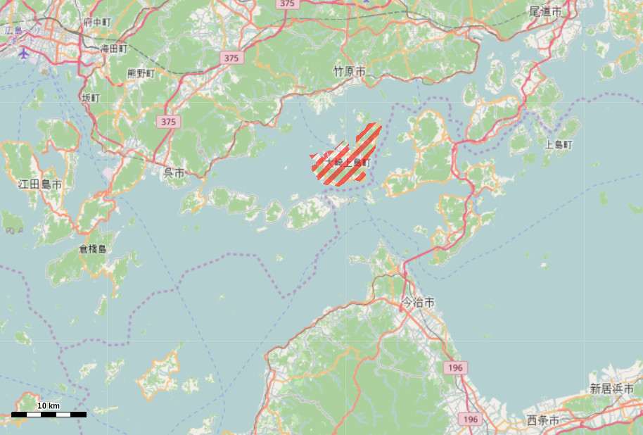 広島県の大崎上島周辺 This map may be incomplete, and may contain errors. Don't rely solely on it for navigation.